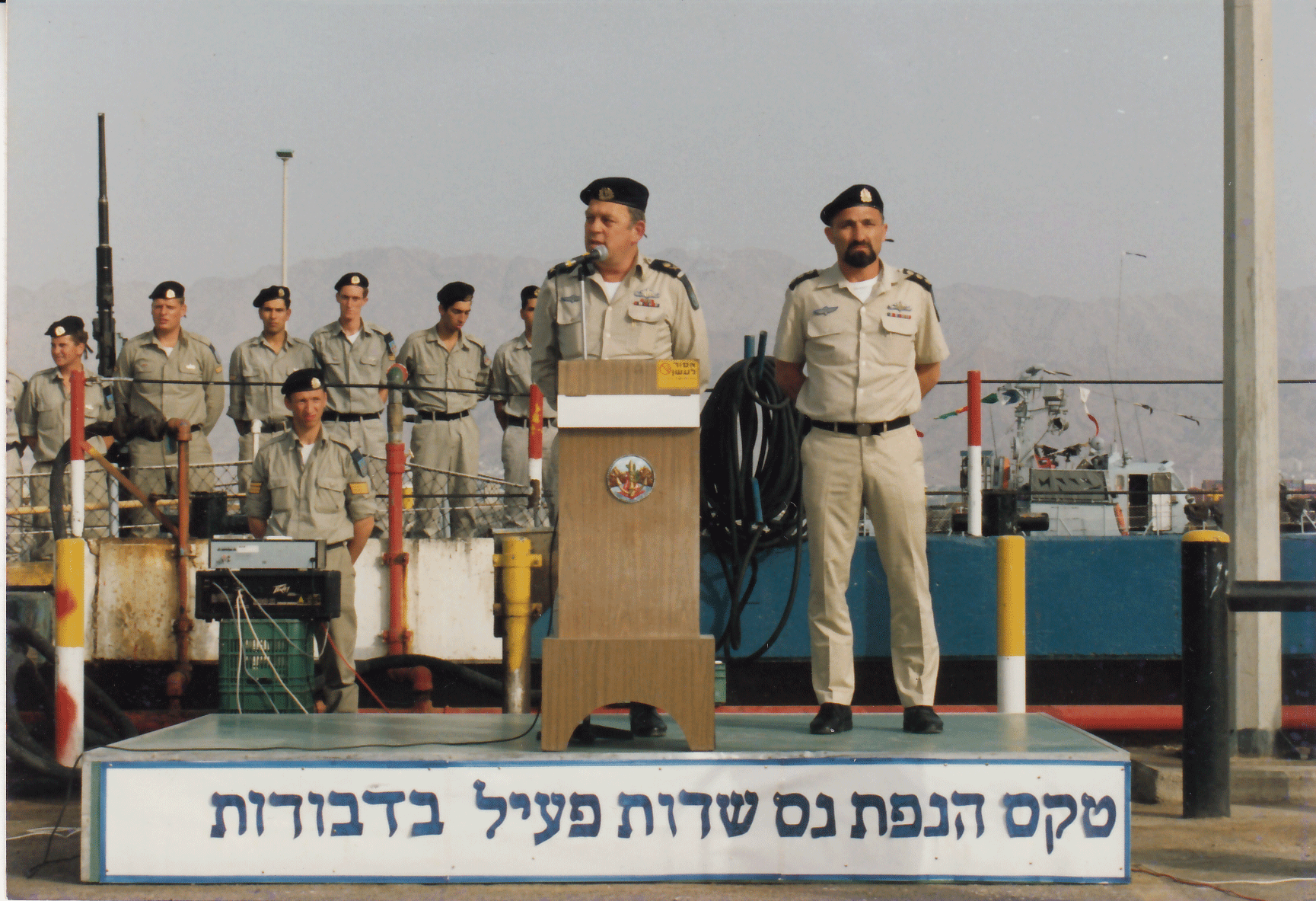 מפקד חיל הים אלוף מיכה רם מברך בנמל אילת את אנשי זירת ים סוף בהנפת נס שירות פעיל על שתי הדבורות שנרכשו מהתעשייה האווירית לידו מפקד הזירה אל"מ אריה גביש, נובמבר 1991.